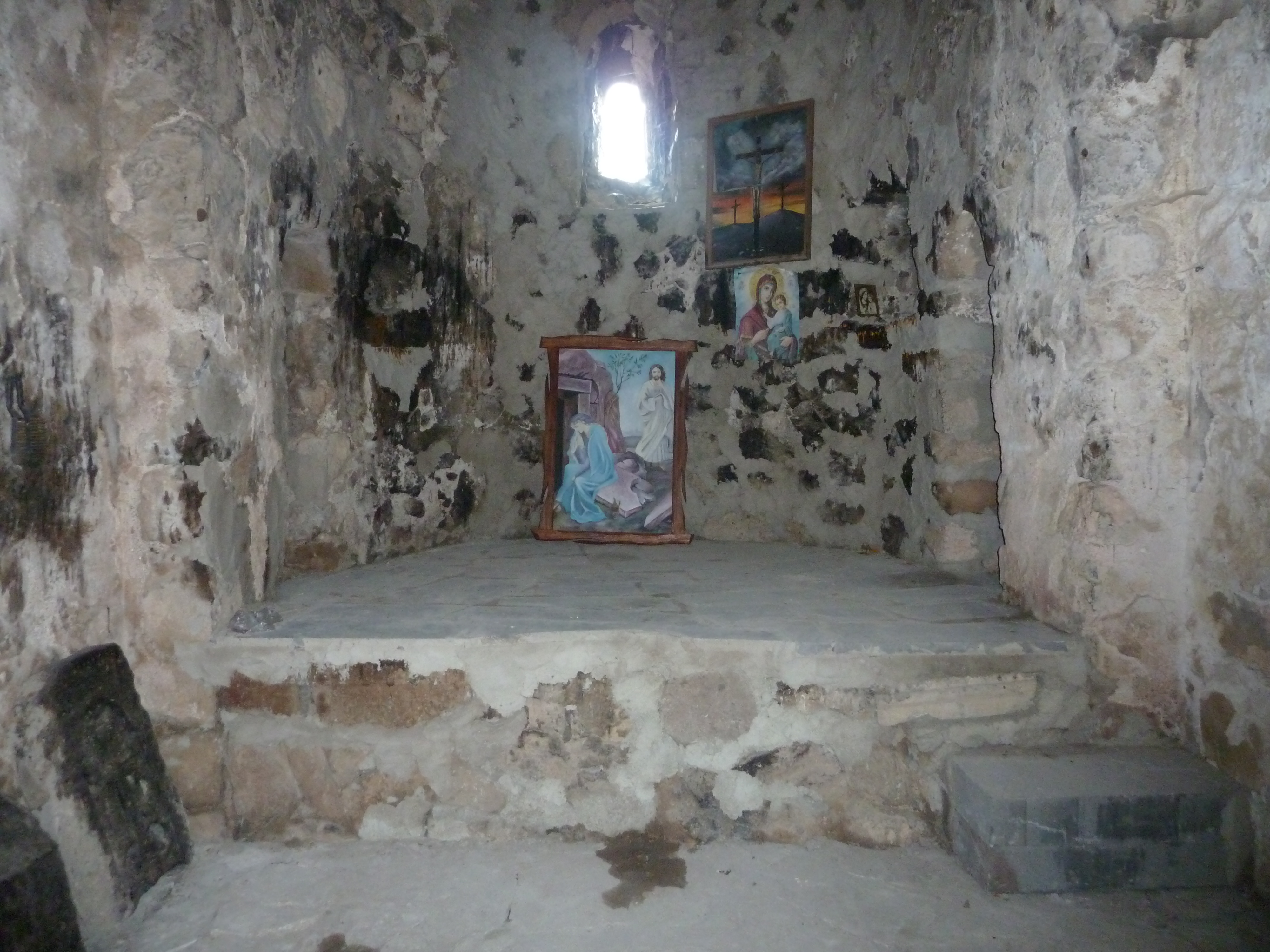 Հայաստանի Հանրապետության Տավուշի մարզում Բերդ քաղաքից 2 կմ դեպի արևմուտք հեռավորության վրա, Նավուր գյուղ տանող ճանապարհի ձախ կողմում գտնվող Մարիամ Մայրի վանքի (կամ էլ՝ Մարիամ Մայրի եկեղեցի, Մարիամ Մայրի մատուռ, Սուրբ Նշան եկեղեցի) սեղանի բեմը